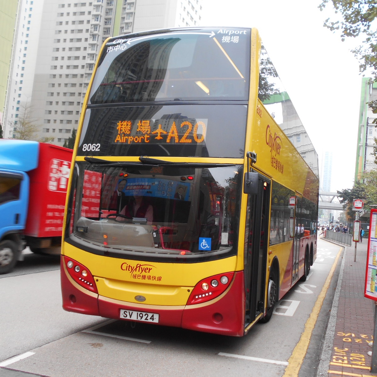 中文（香港）: 城巴機場快線A20，駛經長沙灣道近元州邨前往機場